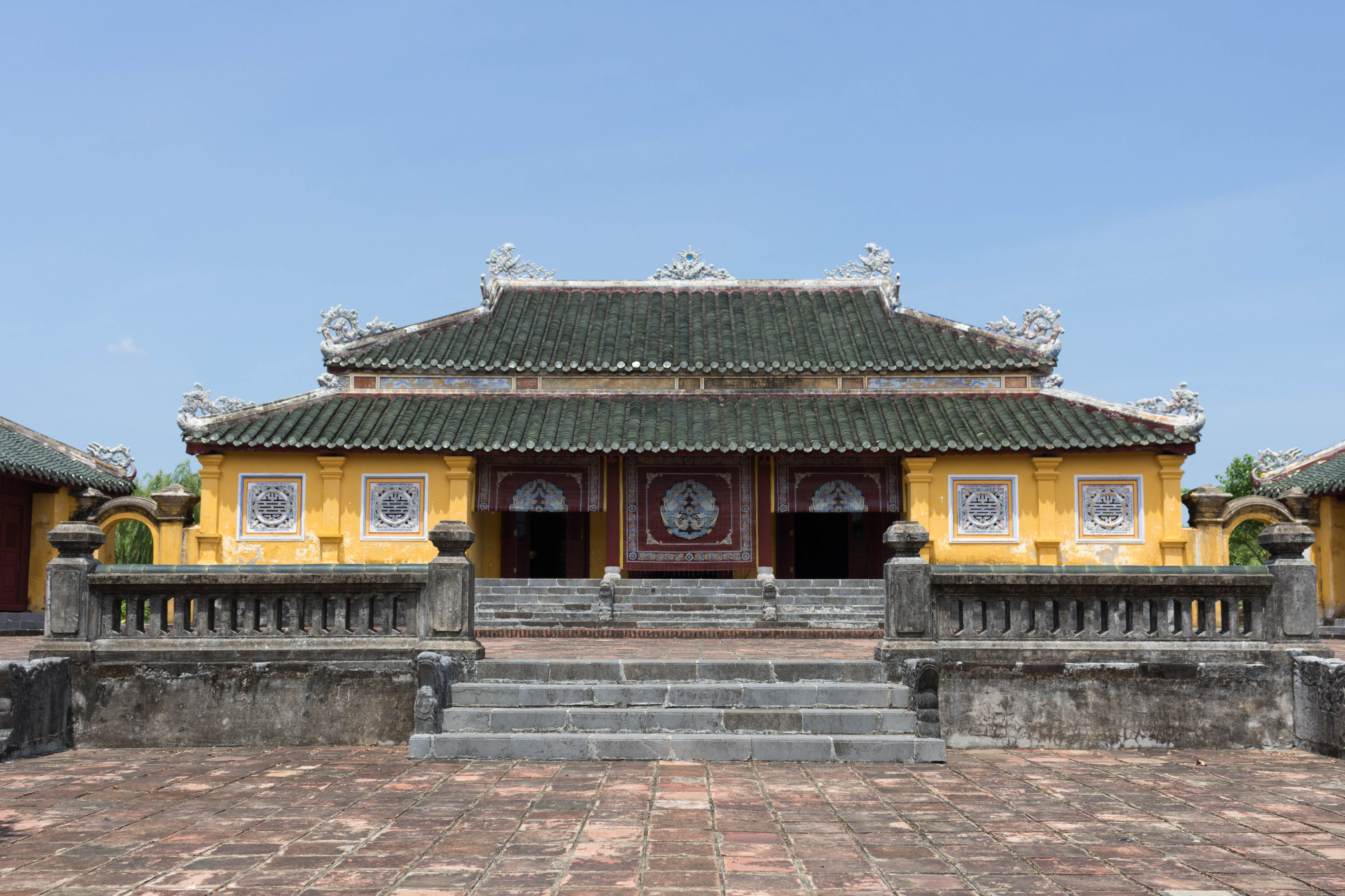 Cung Trường Sanh, nơi ở của Thái Hoàng Thái Hậu, thuộc Hoàng thành Huế